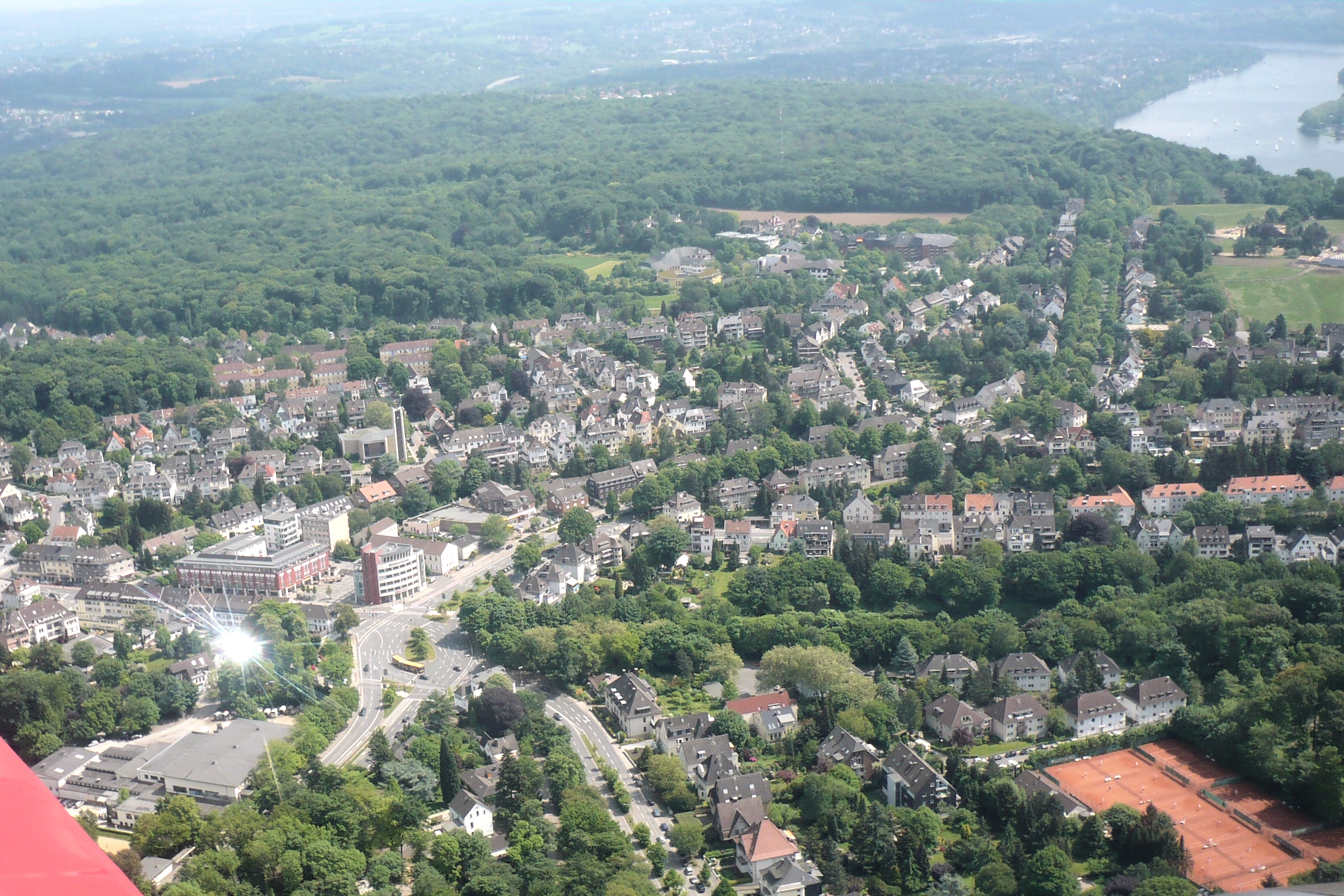 Essen-Stadtwald, Luftbild, Bilck von Nordwesten